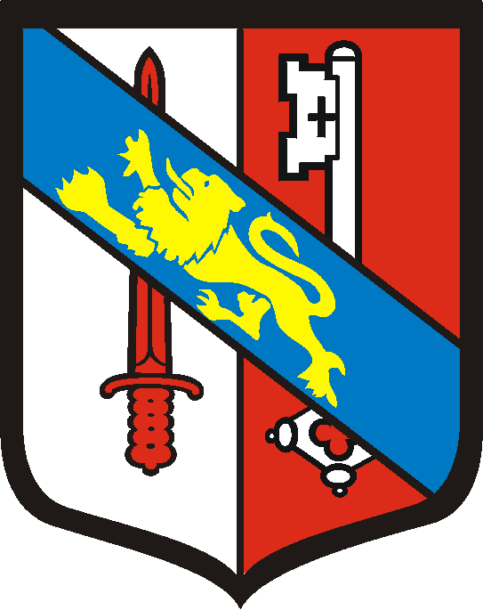 Wappen von Vufflens-la-ville Kanton Waadt Schweiz